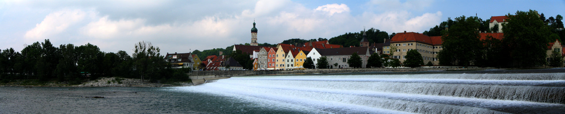 Beschreibung: Lechwehr mit Landsberg am Lech im Hintergrund Quelle: selbst fotografiert Datum: 12. Juni 2005 Fotograf / Zeichner: Patrick Huebgen Kategorie:Bild:Panorama Kategorie:Landsberg am Lech